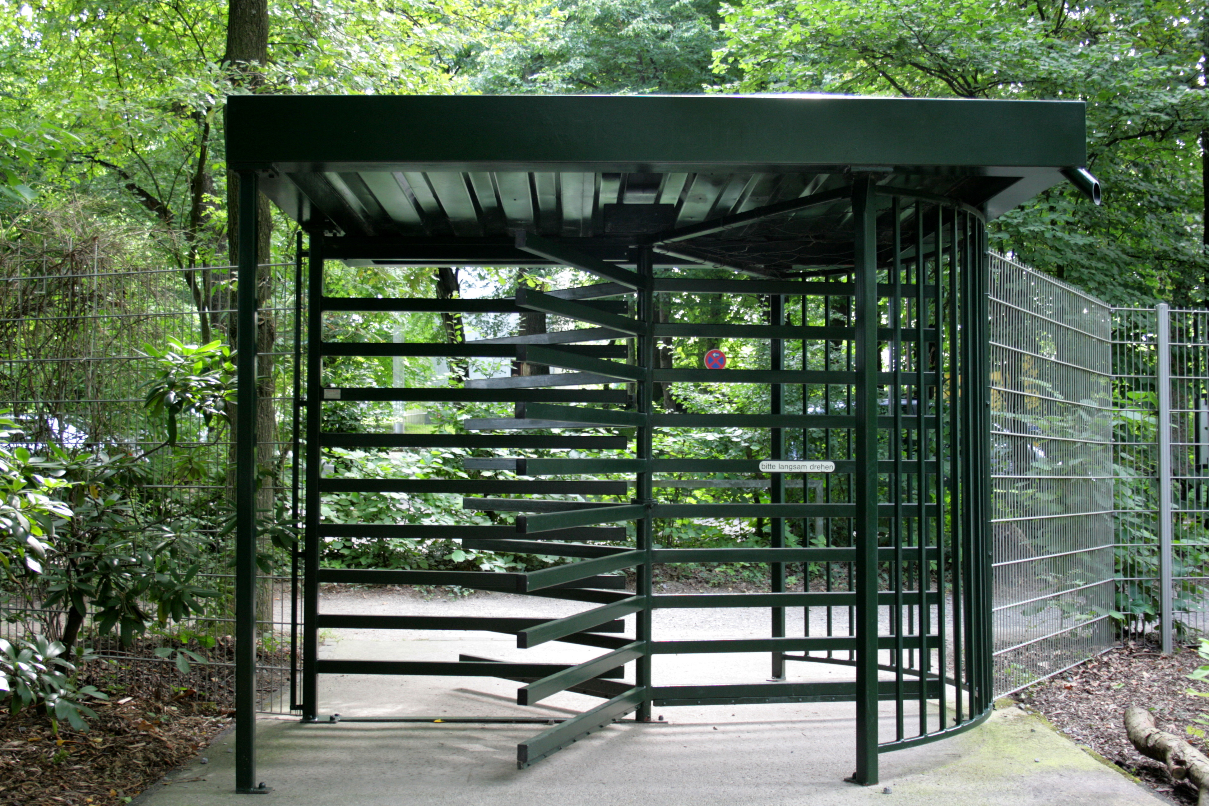 Tierpark Fauna in Solingen-Gräfrath